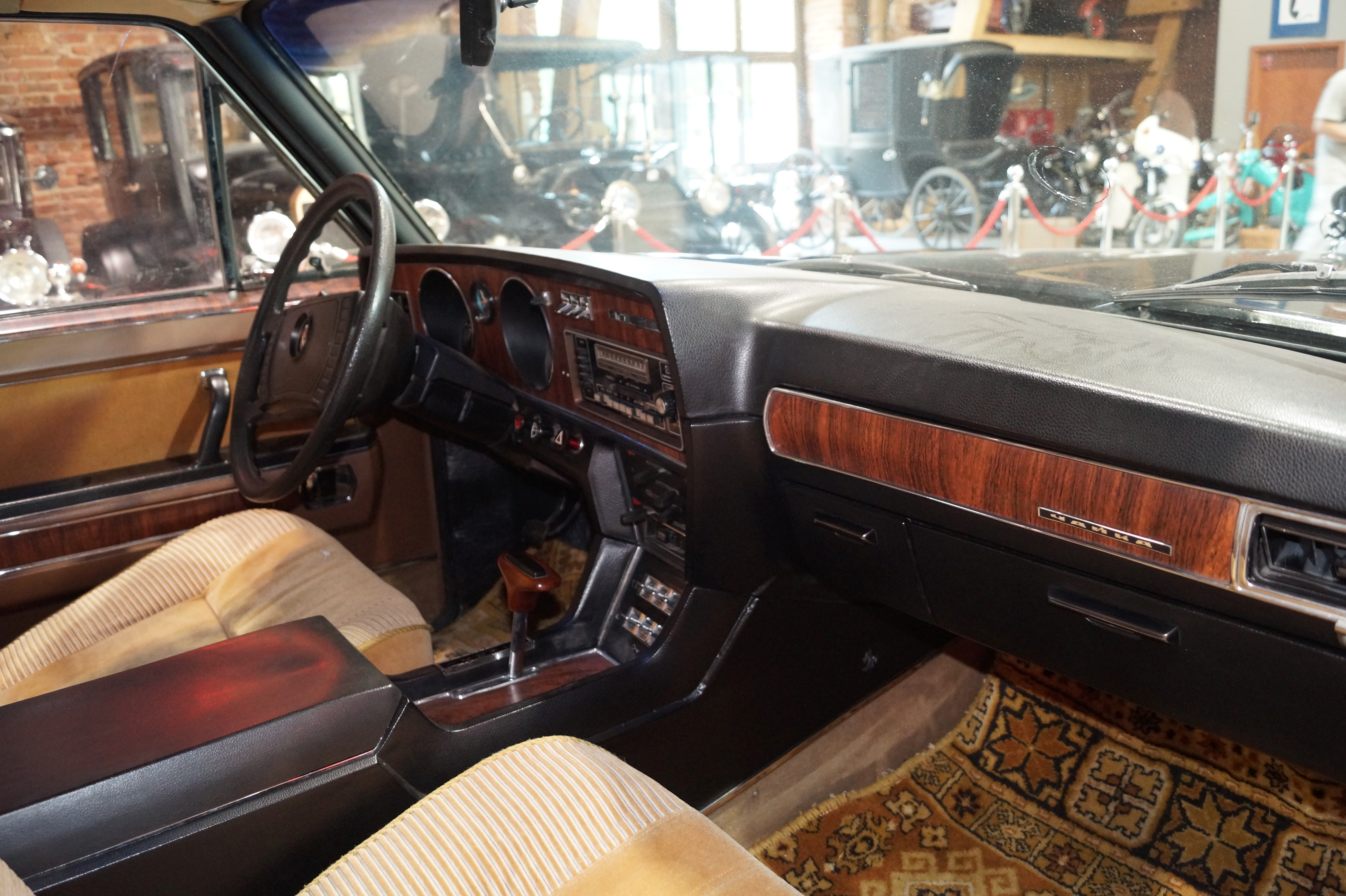 This photo was taken during Automotive Wikiexpedition 2016 set up by Wikimedia Polska Association. You can see all photographs in category Wikiekspedycja motoryzacyjna 2016. English | Polski | +/− Wnętrze GAZa-14 Czajka w Muzeum Motoryzacji Topacz w Ślęzie